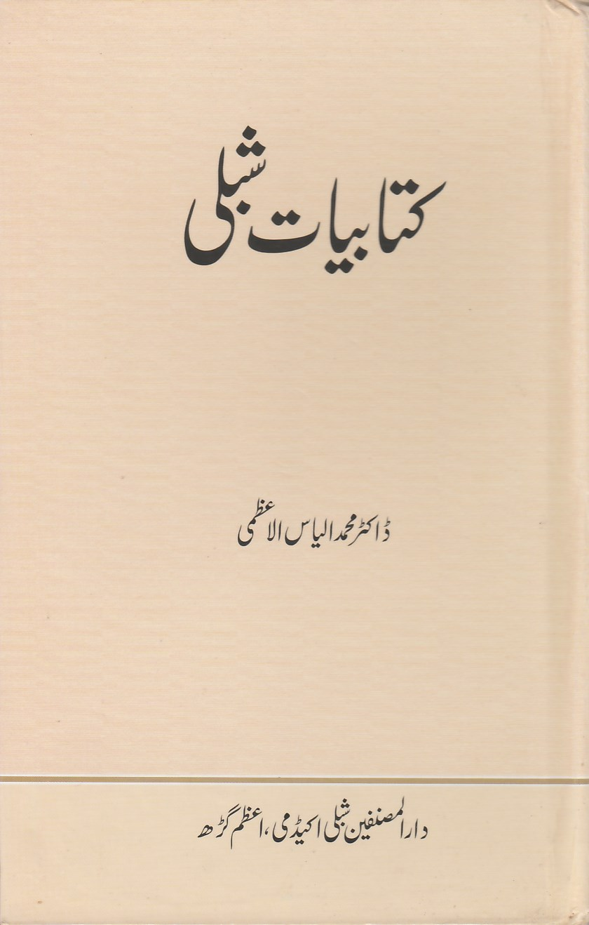 سرورق کتاب کتابیات شبلی از محمد الیاس الاعظمی